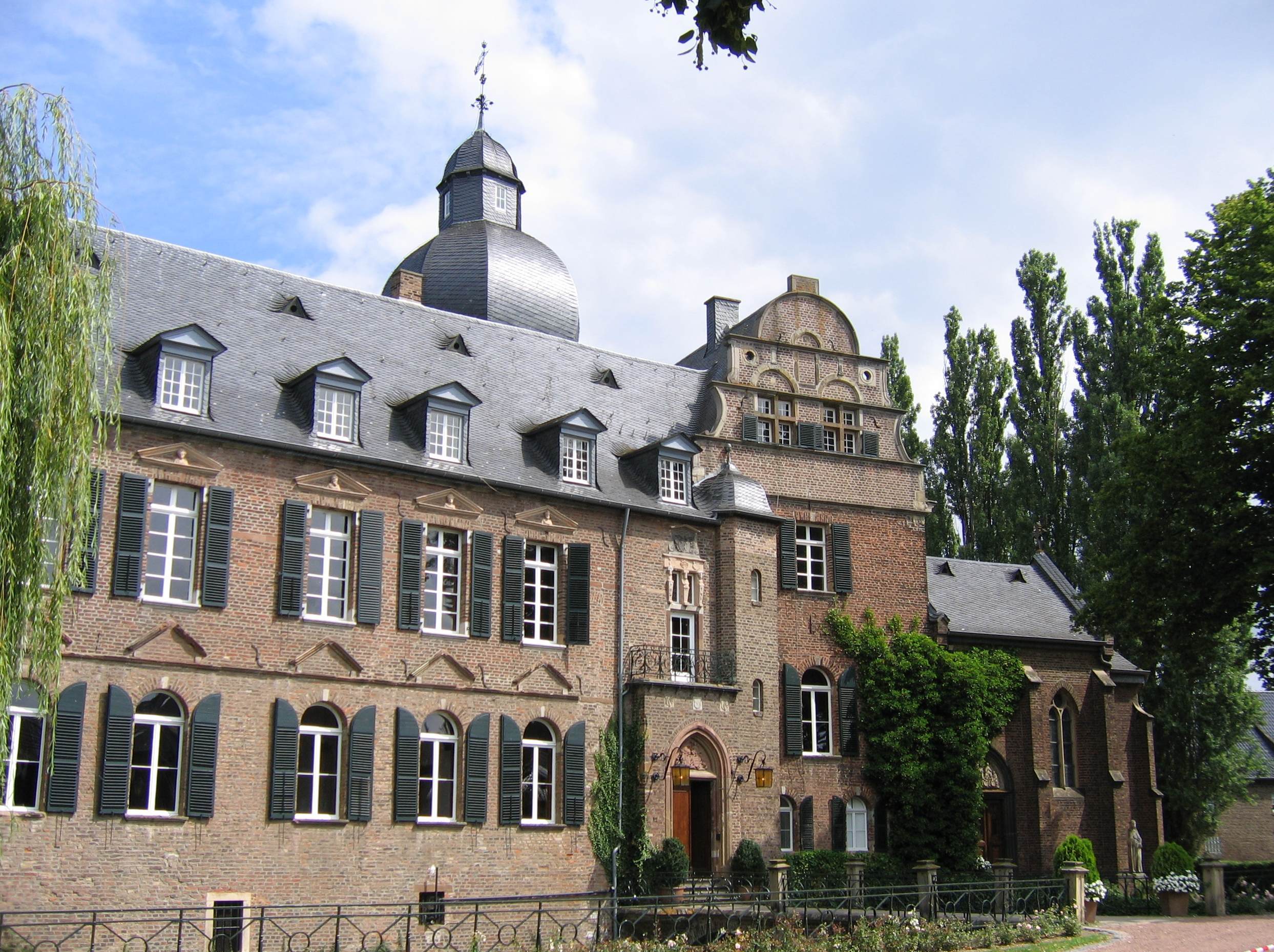 Burg Bergerhausen, Südseite